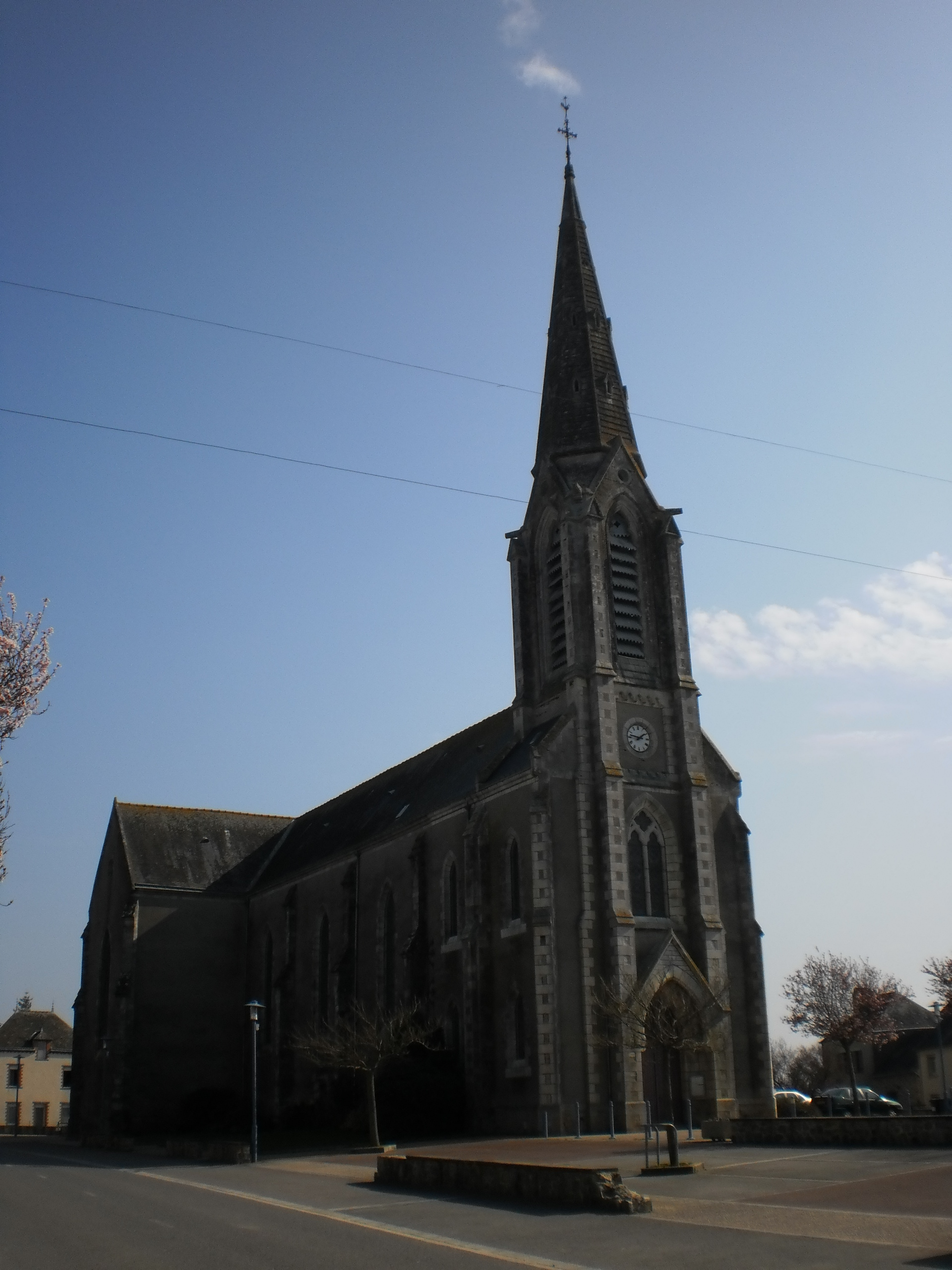 Pierric (Loire-Atlantique, France) - école